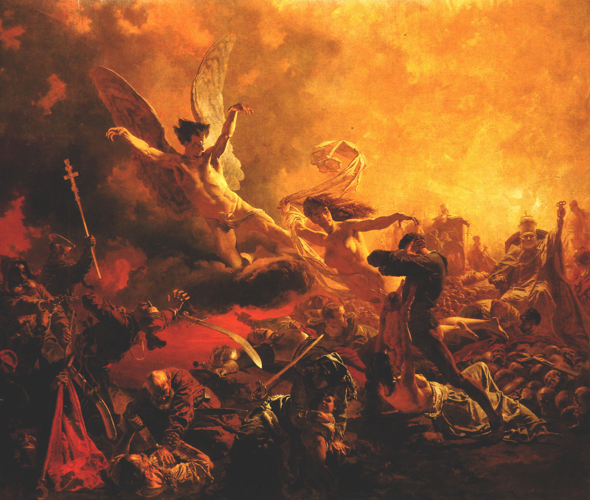 Hungarian: A démon fegyverei (A rombolás géniuszának diadala)